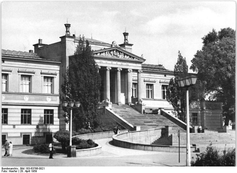 Schwerin, Volksmuseum Zentralbild Hoefer 28.4.1959 Schwerin: Das Museum.